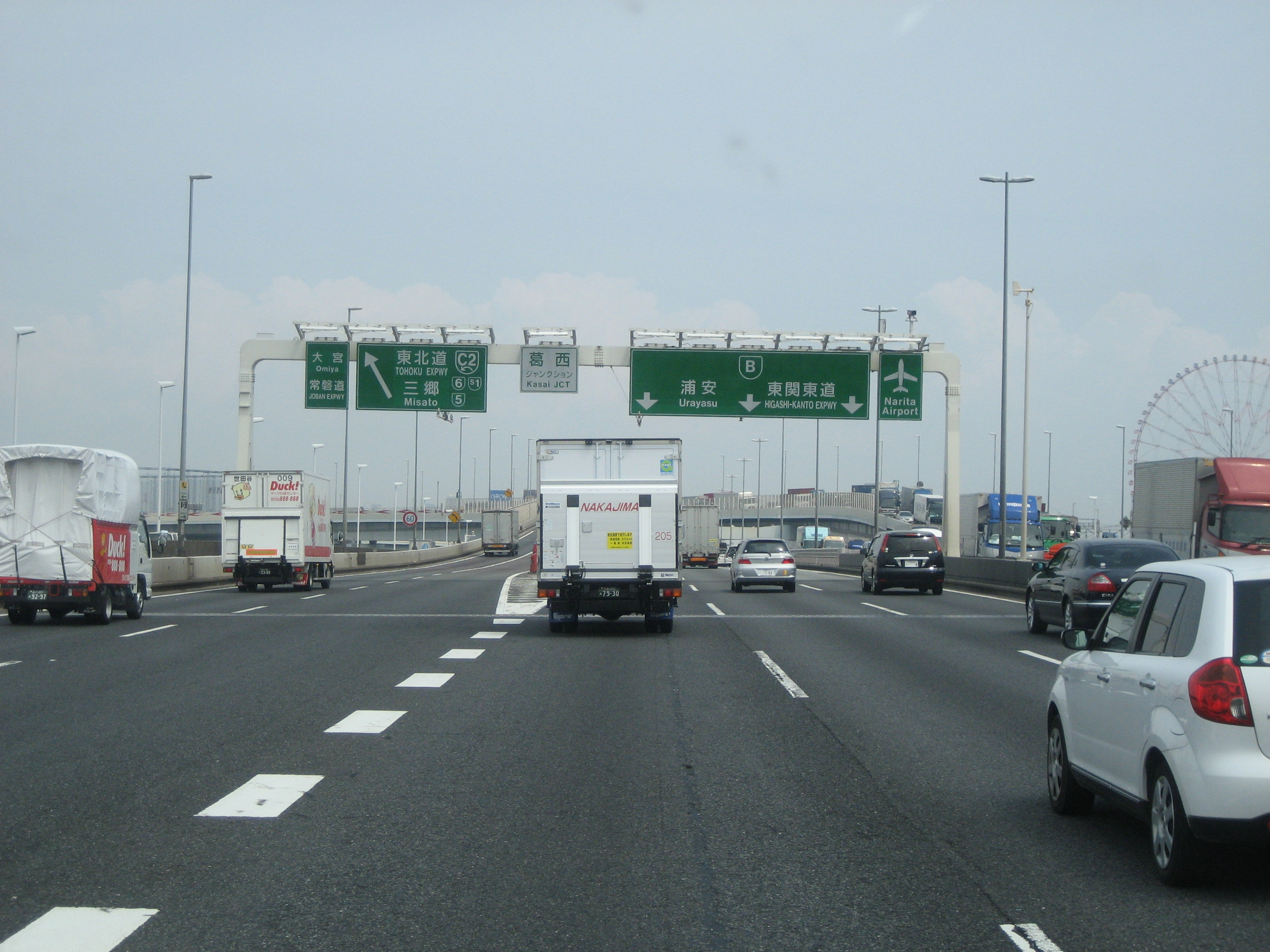 首都高速葛西JCT